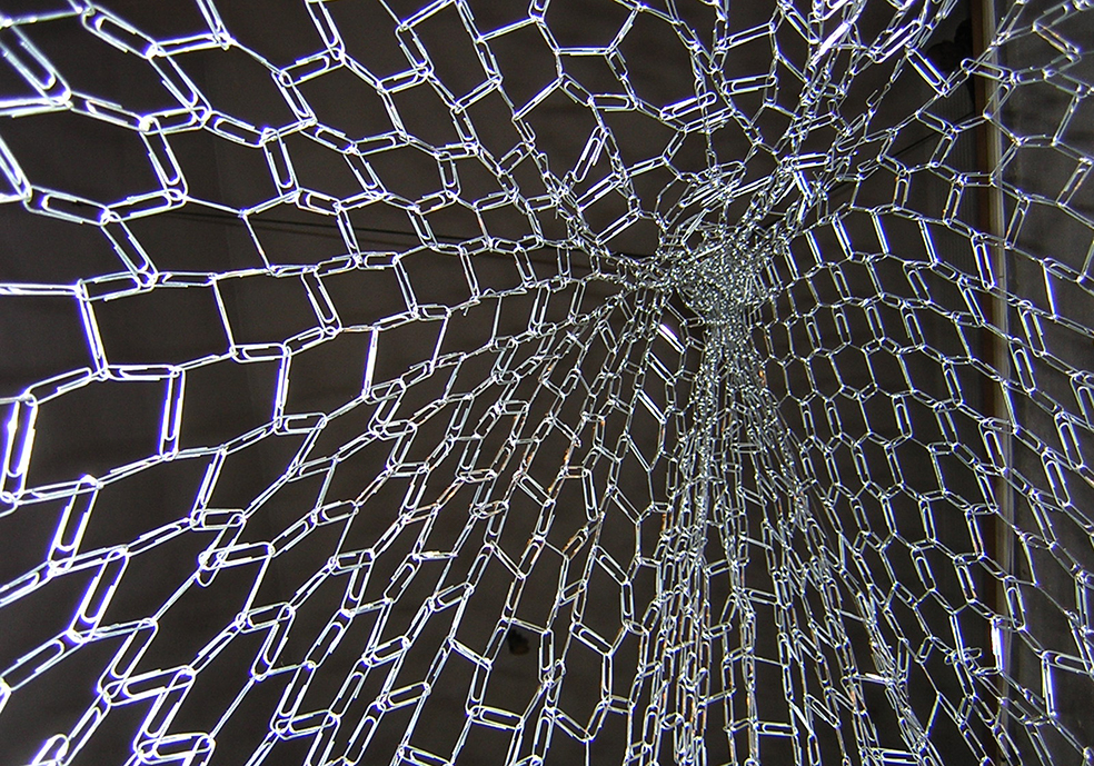 אפרת קליפשטיין, צלם רון עמיר Handle With Care מוזיאון ינקו דאדא 2004 פרט